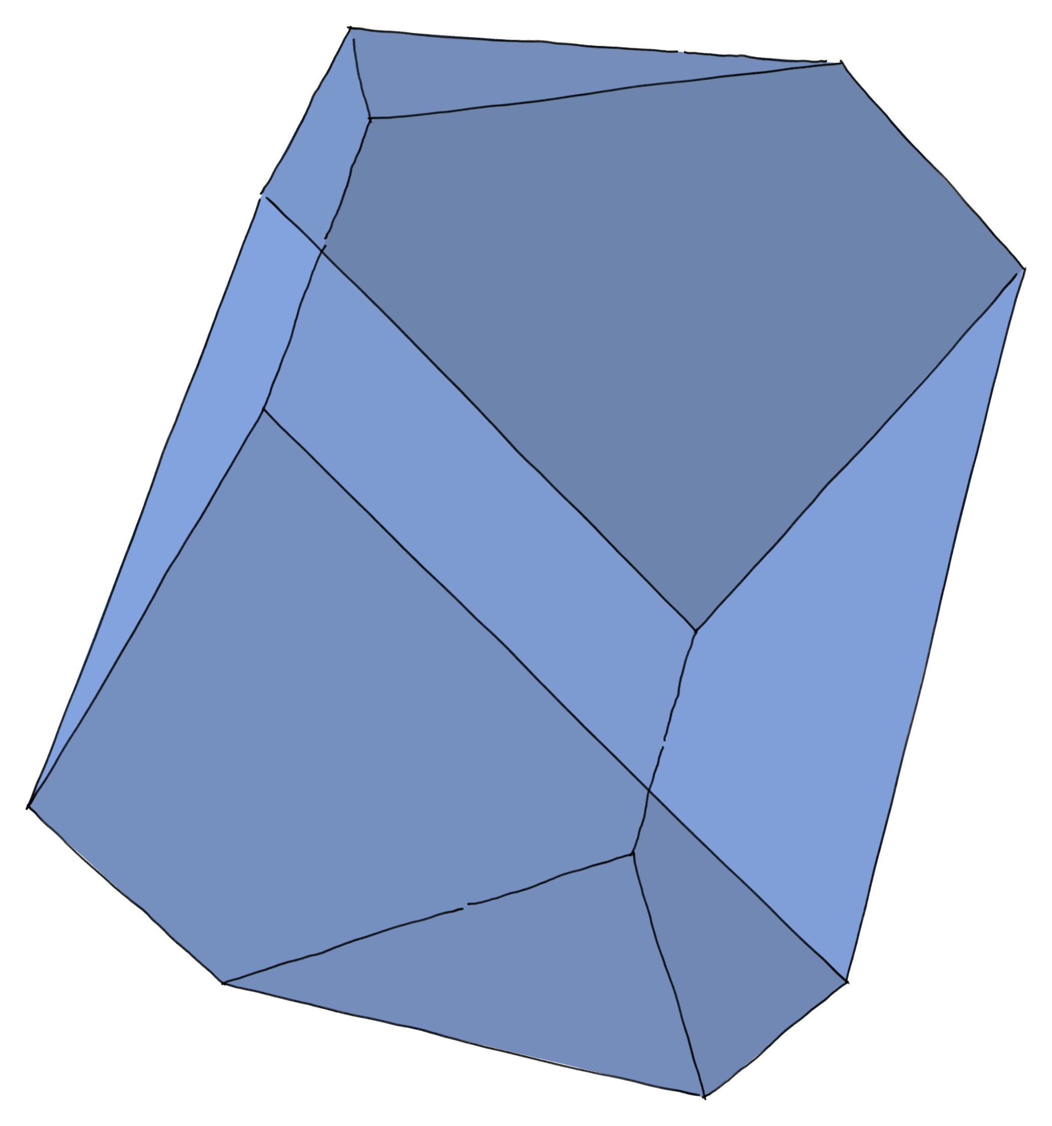 korrekte 3D-Konstruktion eines Rhomboederstumpfes, Körper transparent, Linien im Freihandstil — Erstellt mit Google Sketchup 6, Exportiert als PNG, Freigestellt und zugeschnitten mit Gimp